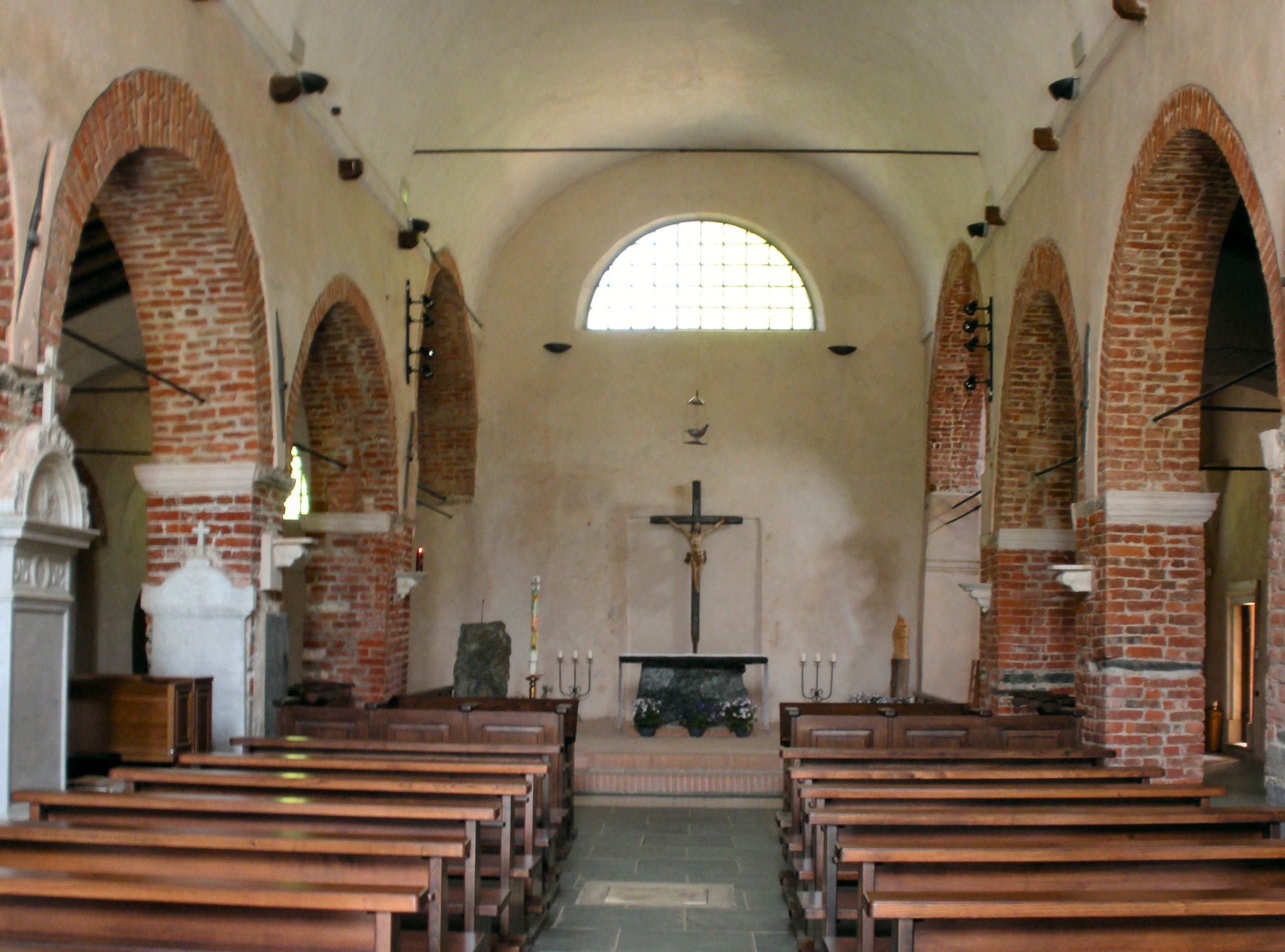 Interno della chiesa dell'Abbazia di Santa Maria alla Croce (Tiglieto, Genova) Foto propria Aprile 2009